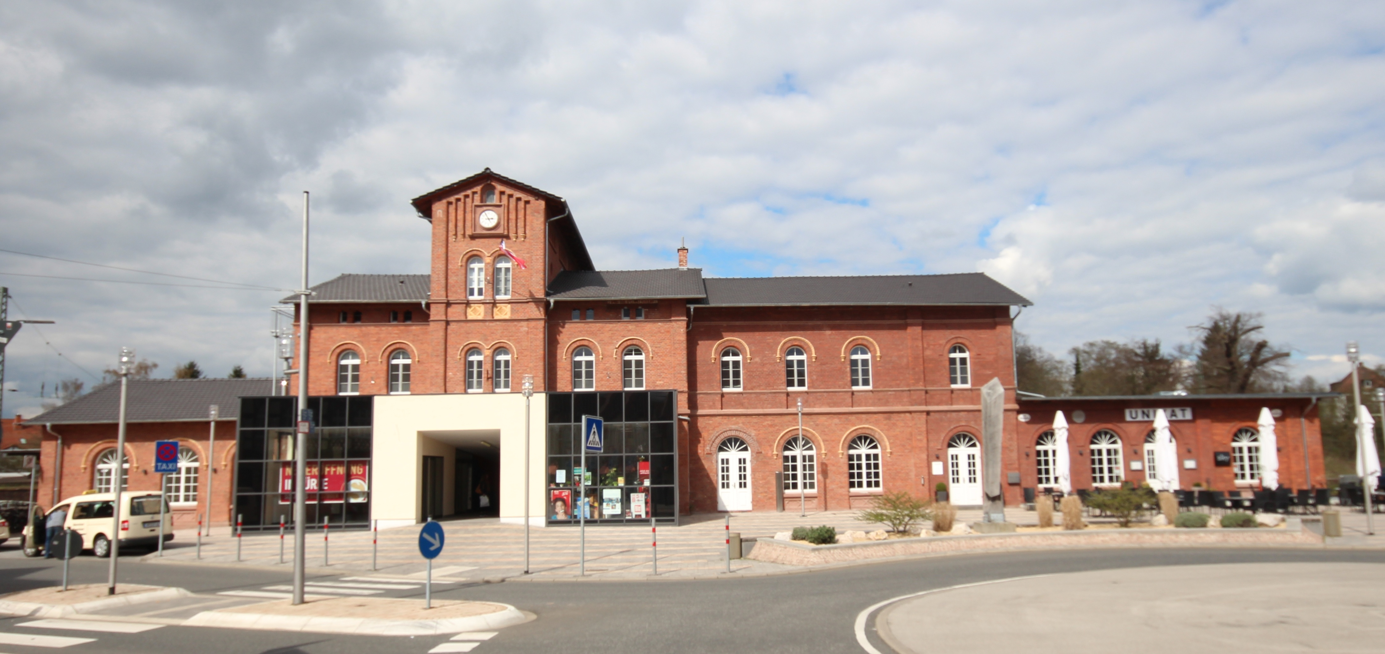 Empfangsgebäude des Bahnhofs Kirchhain (Bz Kassel) nach der im Dezember 2015 mit der Installation der Uhr abgeschlossenen Renovierung von der Straßenseite aus gesehen